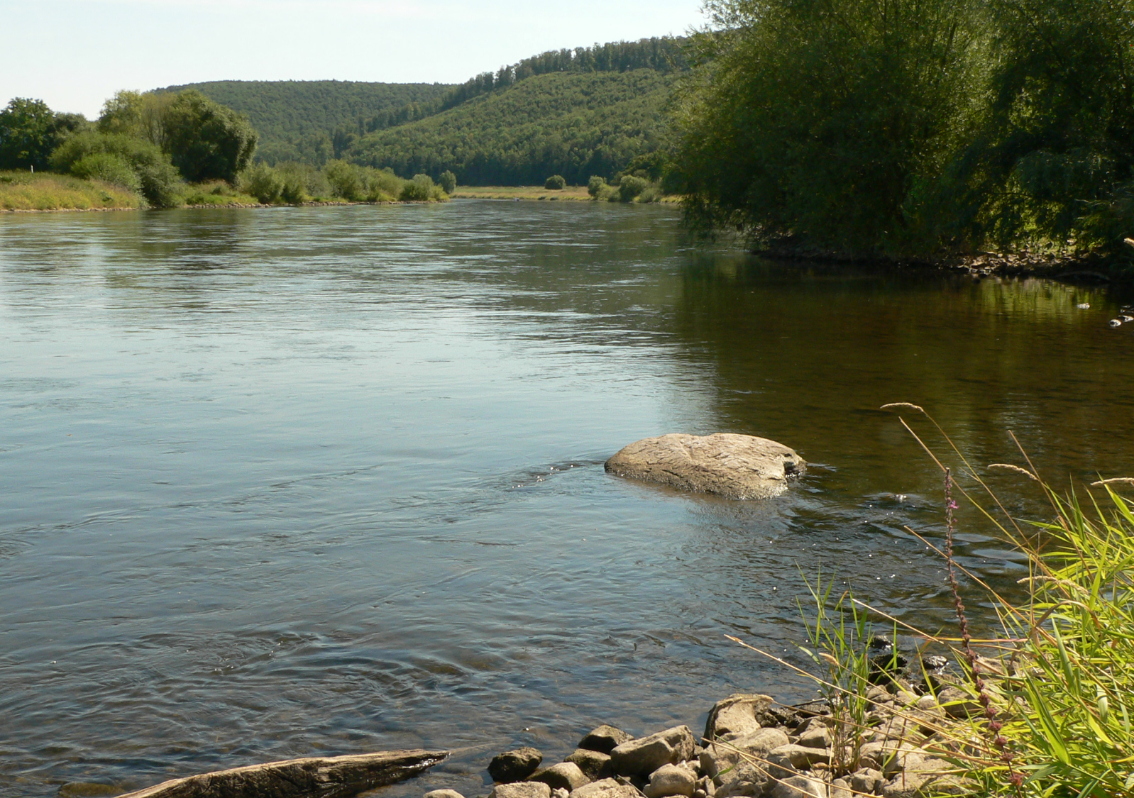 Hajener Hungerstein am westlichen Weserufer